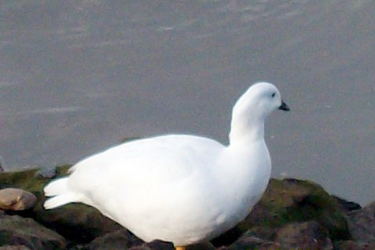 En Argentina